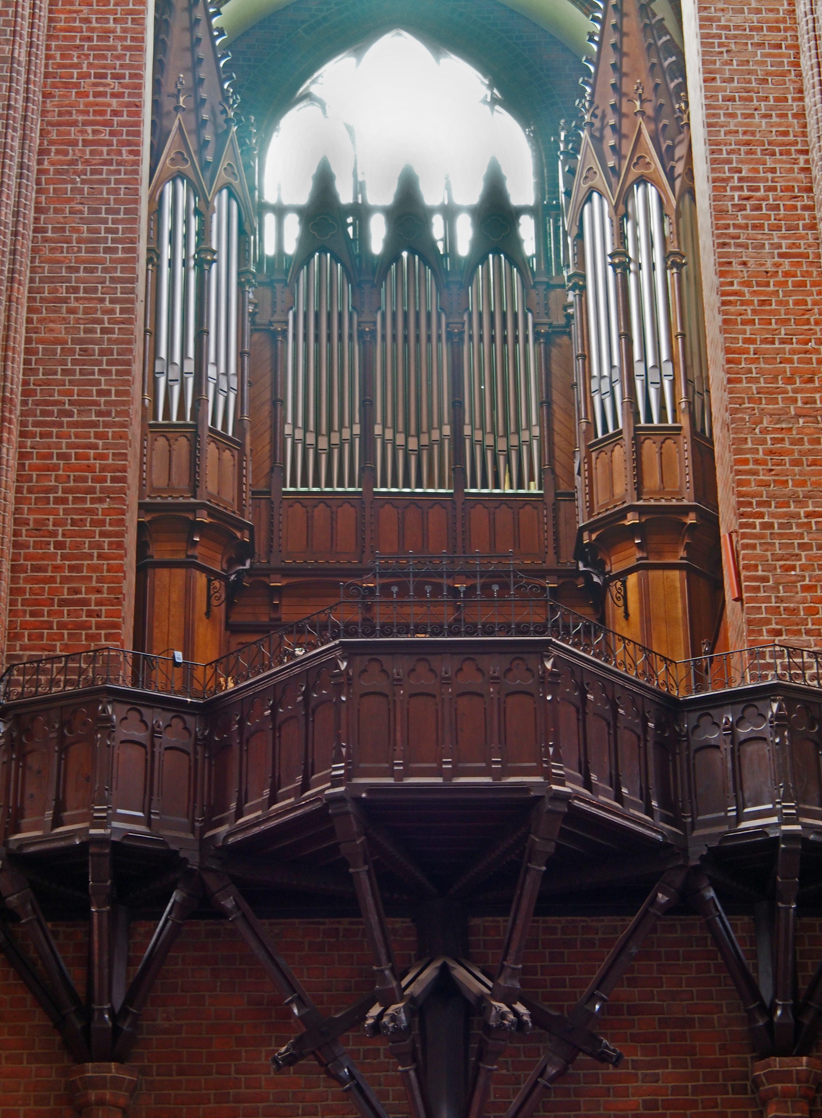 Orgel in St. Nicolai, Lüneburg